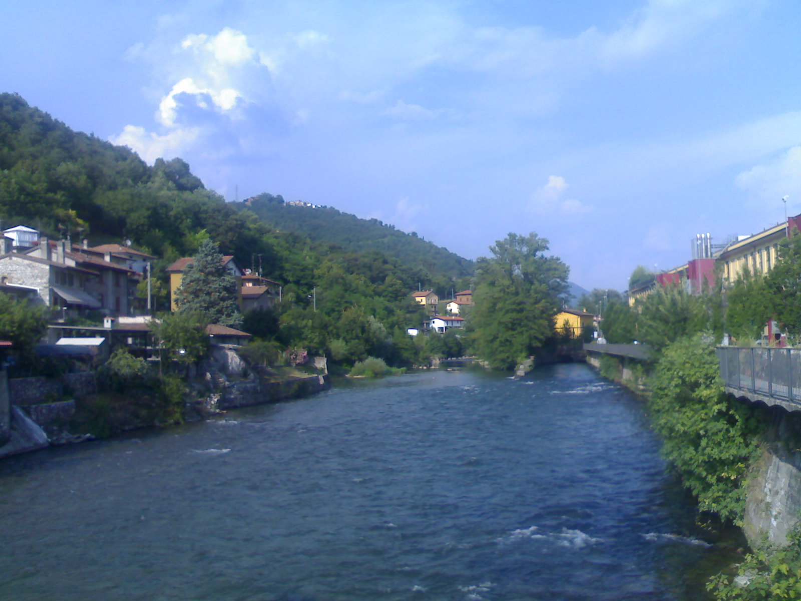 il Fiume Mella a Tavernole. Foto scattata da me. questo non è il fiume mella ma bensì il fiume chiese a Villanuova sul clisi